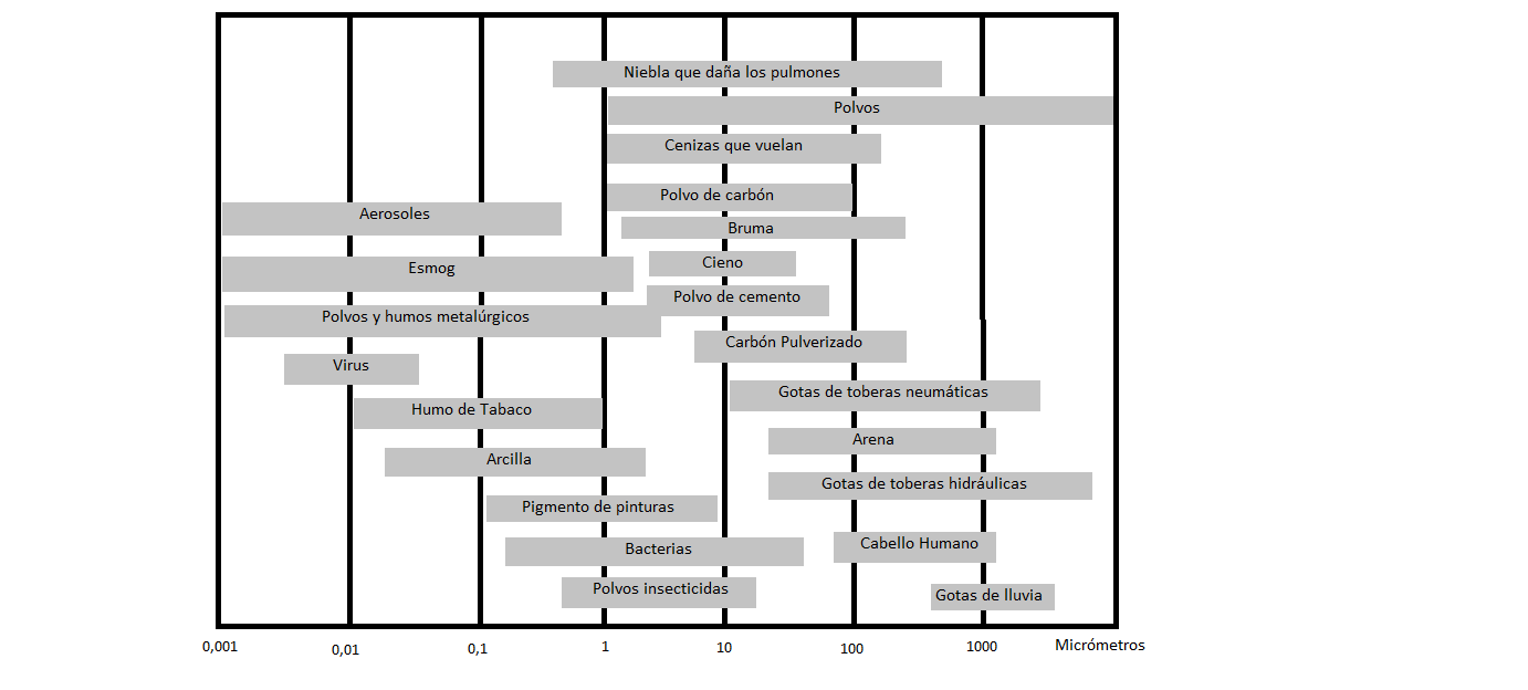 Distribución de diferentes partículas presentes en el aire en micrómetros.